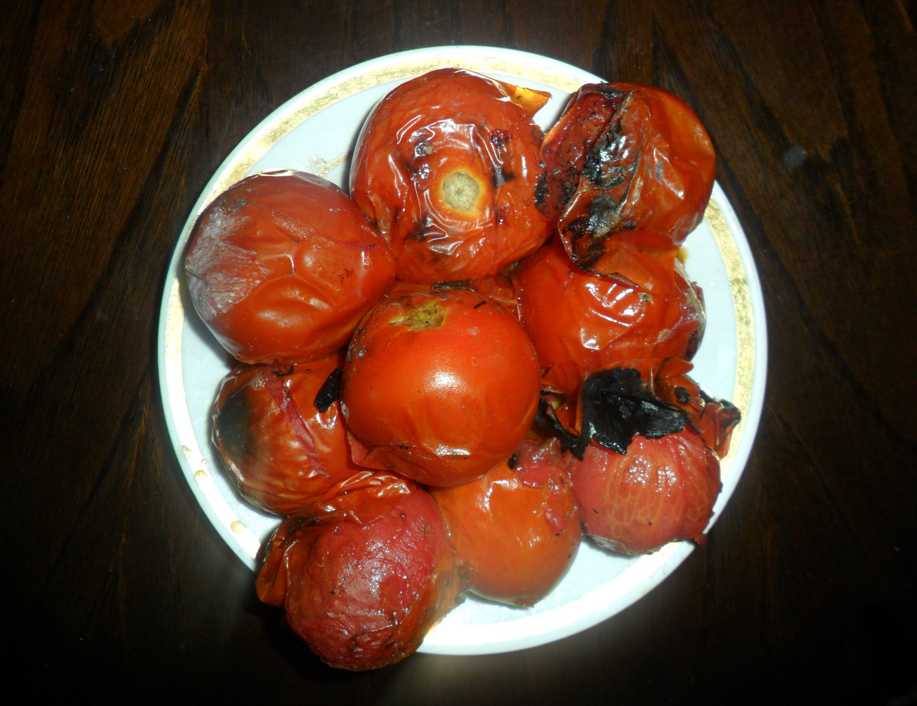 Pomidor kababı